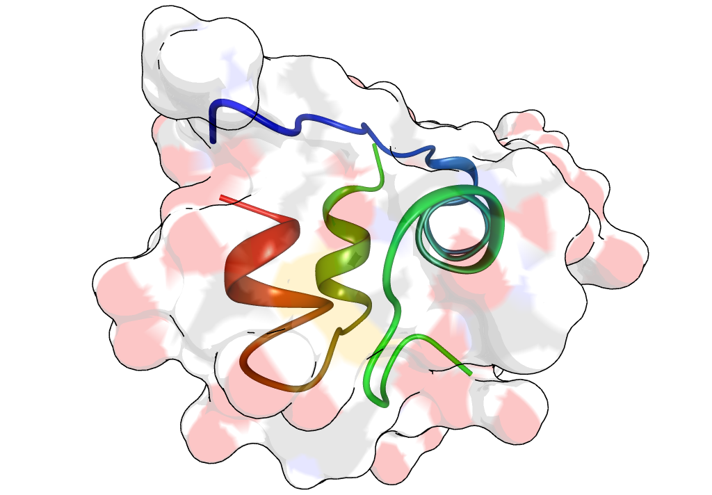 Insulinstruktur: SES und Sekundärstruktur für 1B2G. Softwarewerkzeug: Die Struktur wurde von mir mit BALLView generiert.